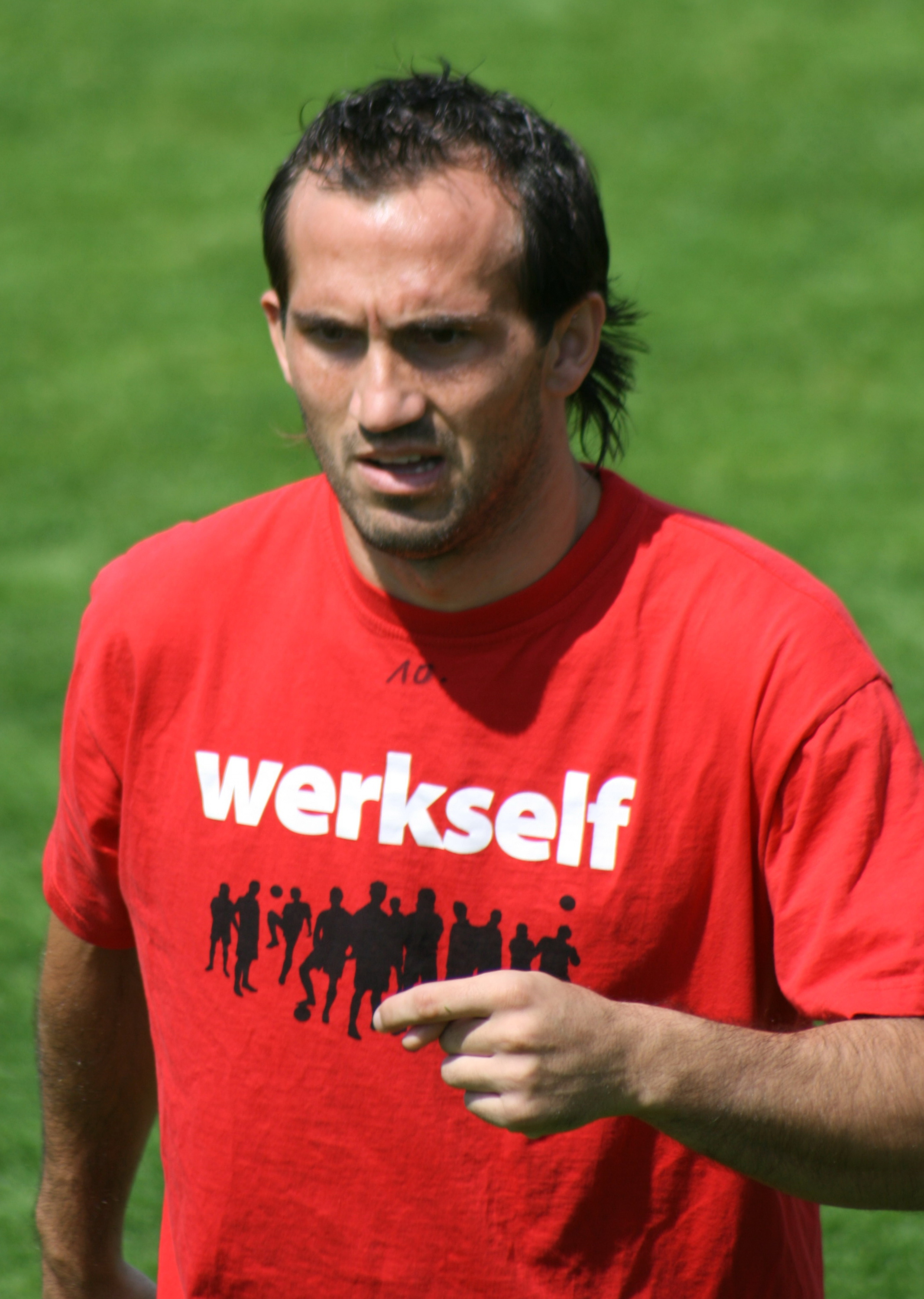 Theofanis Gekas beim Training von Bayer 04 Leverkusen